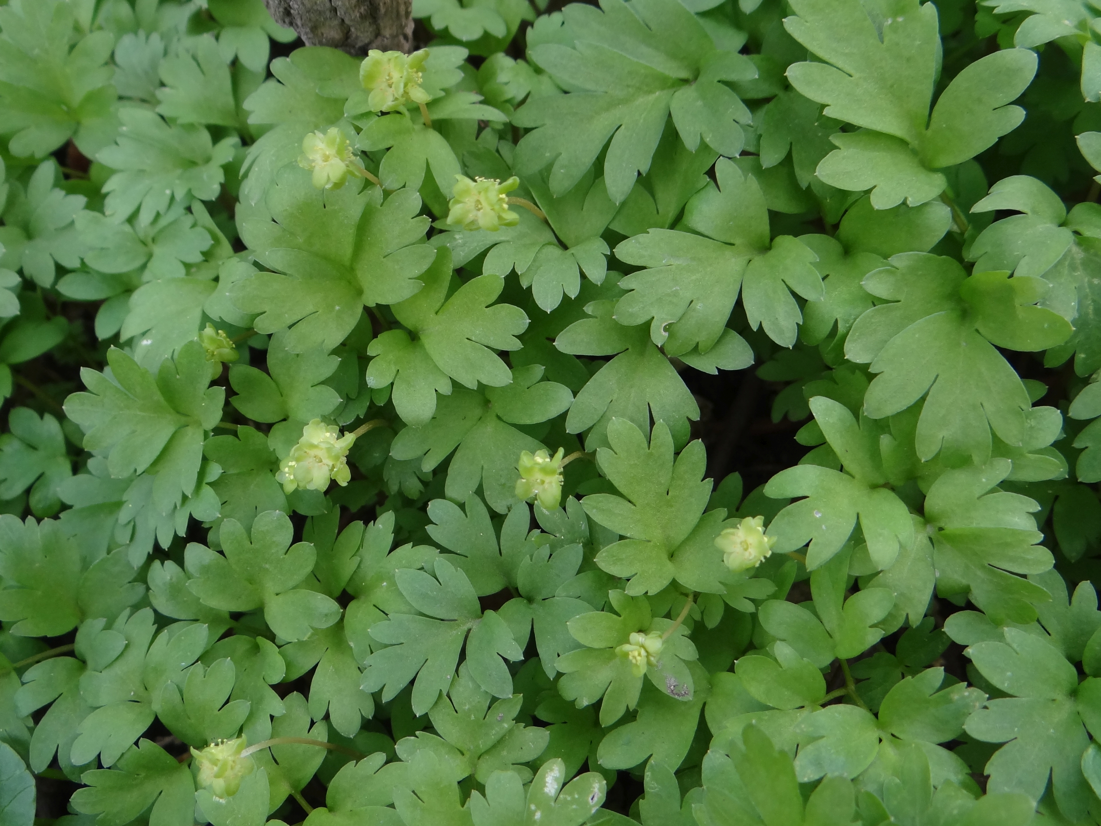 Adoxa moschatellina. Location: Poland, Kraków, Wzgórza Tynieckie